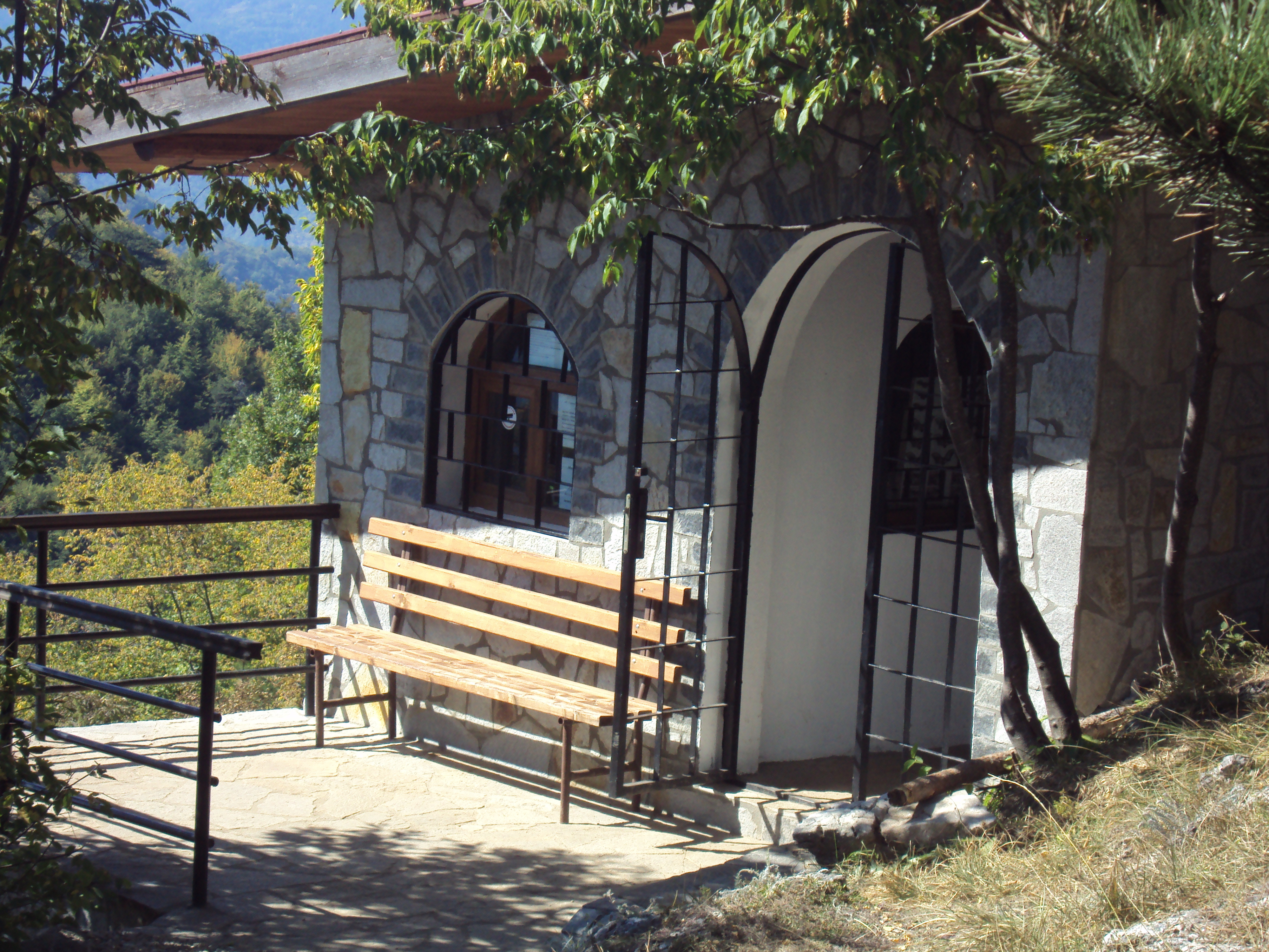 Добростански бисер